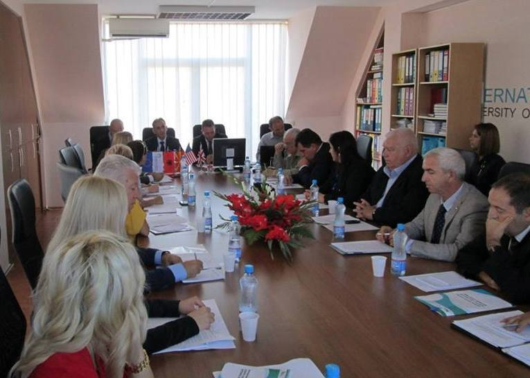 U zhvillua mbledhja e 48 e Senatit të Universitetit Ndërkombetar Strugë